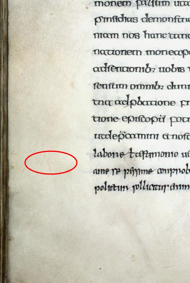 Collectio canonum Sanblasiana, Fol. 122v (markiertes Detail: mit einer Griffelglosse am linken Rand auf der Höhe der zweiten und dritten Zeile von unten)